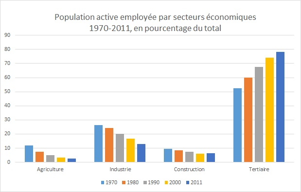 Tshivenda: Variation en pourcentage de la population active employée par secteurs en France de 1970 à 2011.